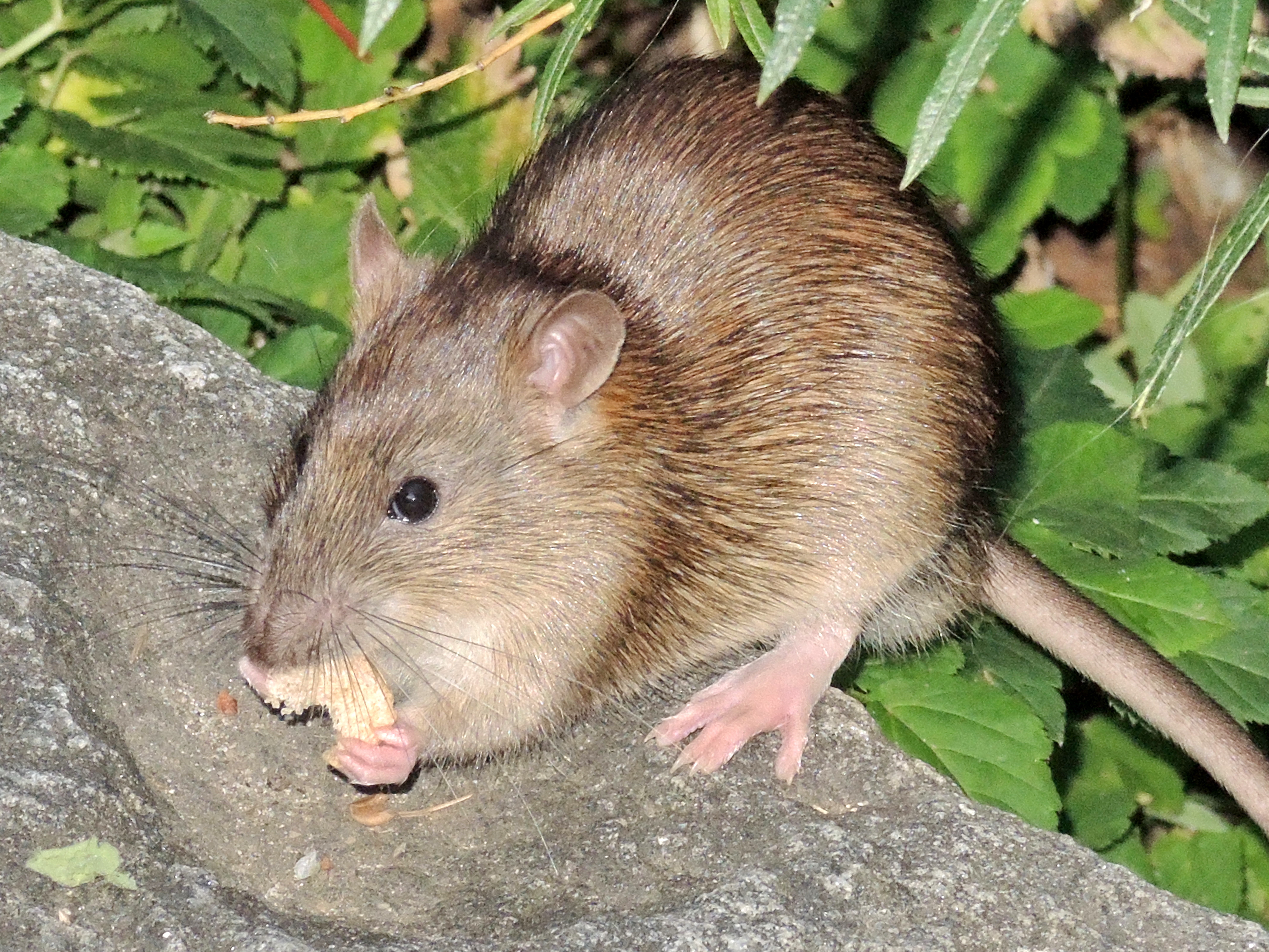 Arboretum in Zürich-Enge